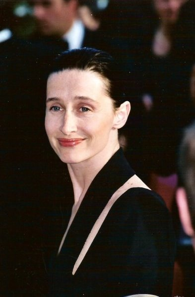 Anne Brochet au festival de Cannes